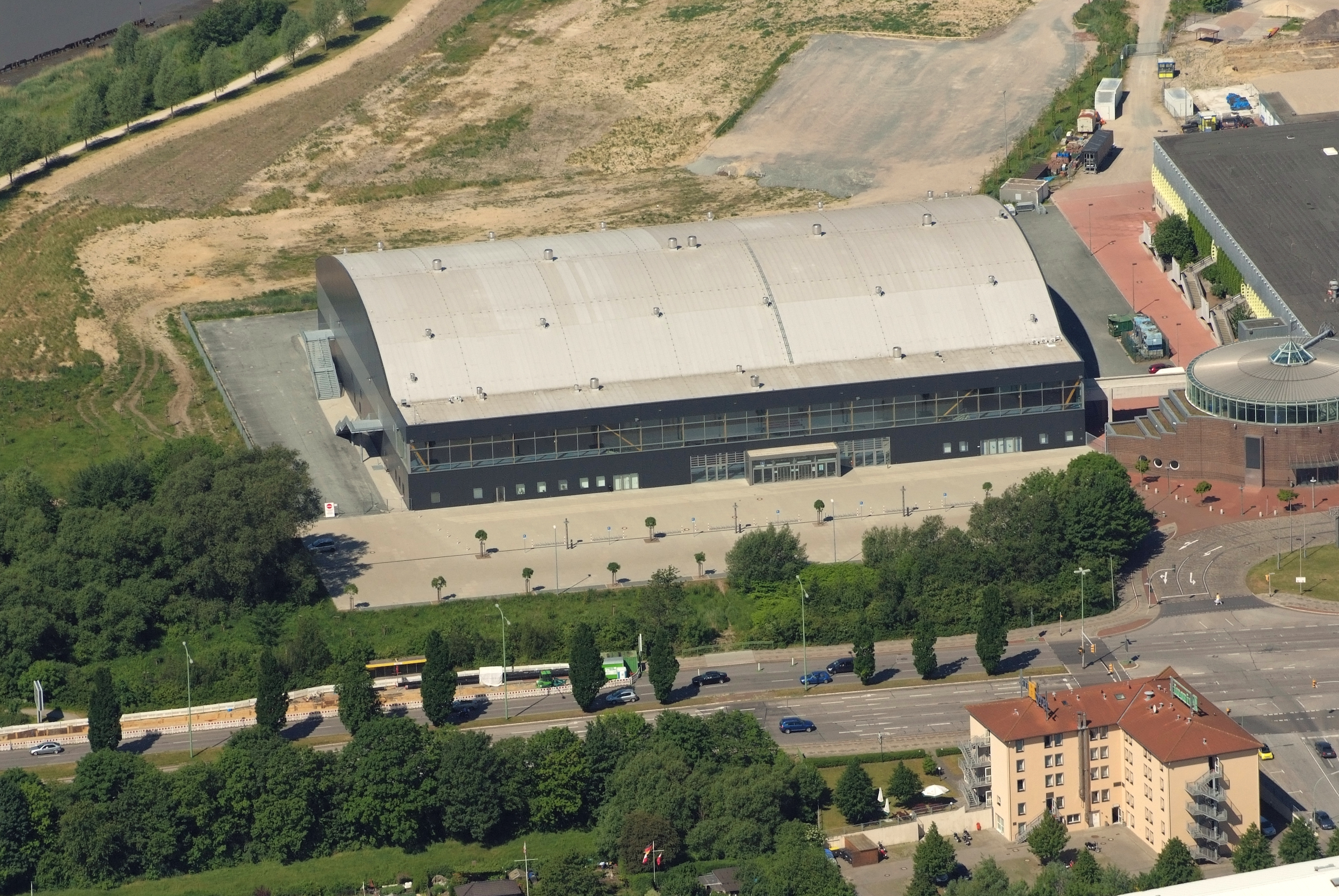 Eisarena Bremerhaven (Fotoflug vom Flugplatz Nordholz-Spieka über Cuxhaven und Wilhelmshaven)